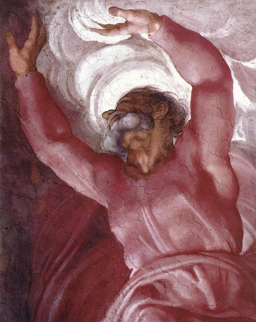 Sistine Chapel, fresco Michelangelo